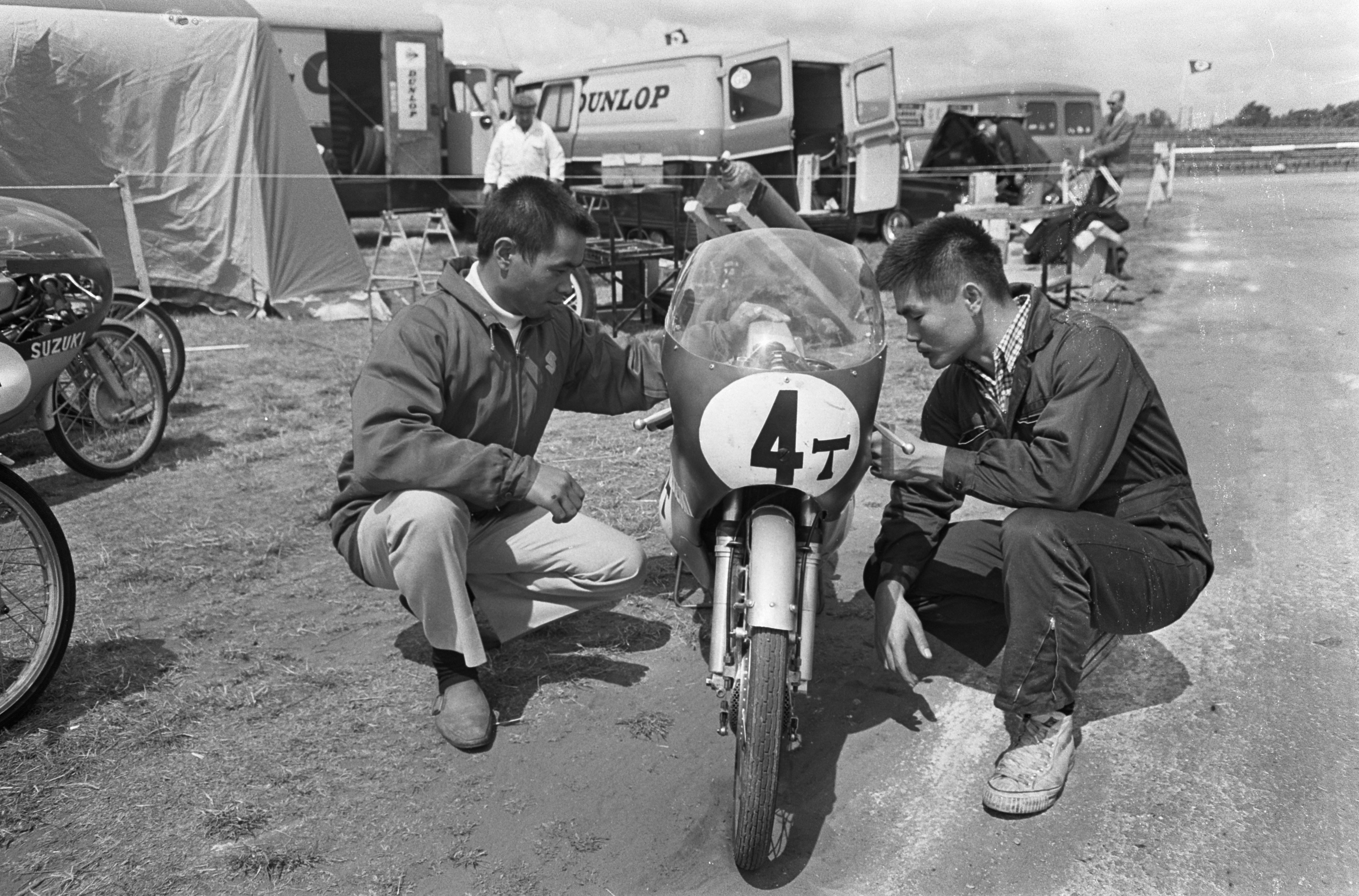 Collectie / Archief : Fotocollectie Anefo Reportage / Serie : TT Assen 1967 Beschrijving : Yoshimi Katayama (Japan, 125cc) van het Suzuki-team (links) met een mecanicien Datum : 21 juni 1967 Locatie : Assen, Drenthe Trefwoorden : motorsport, portretten Persoonsnaam : Katayama, Yoshimi Instellingsnaam : Suzuki Fotograaf : Jack de Nijs / Anefo Auteursrechthebbende : Nationaal Archief Materiaalsoort : Negatief (zwart/wit) Nummer archiefinventaris : bekijk toegang 2.24.01.05 Bestanddeelnummer : 920-4262 Reacties Geplaatst door Ray Battersby op 15 januari 2011 - 11:39. The person at the Right is Taddy (Tadaomi) Matsui, the factory Suzuki mechanic who worked in this role until the 1980s - including Suzuki's 500cc World Championship title years.